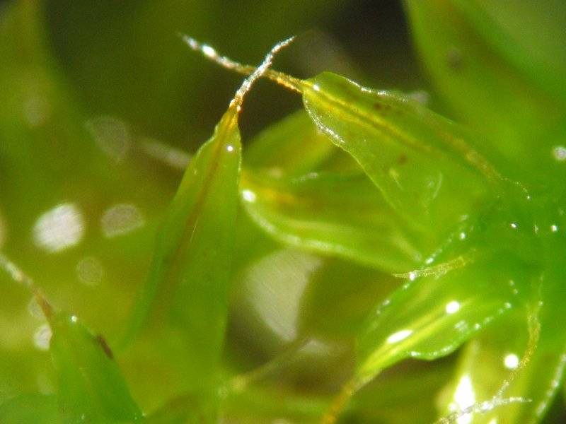 gezähntes, hylines Glashaar von Tortula ruralis, Rostock